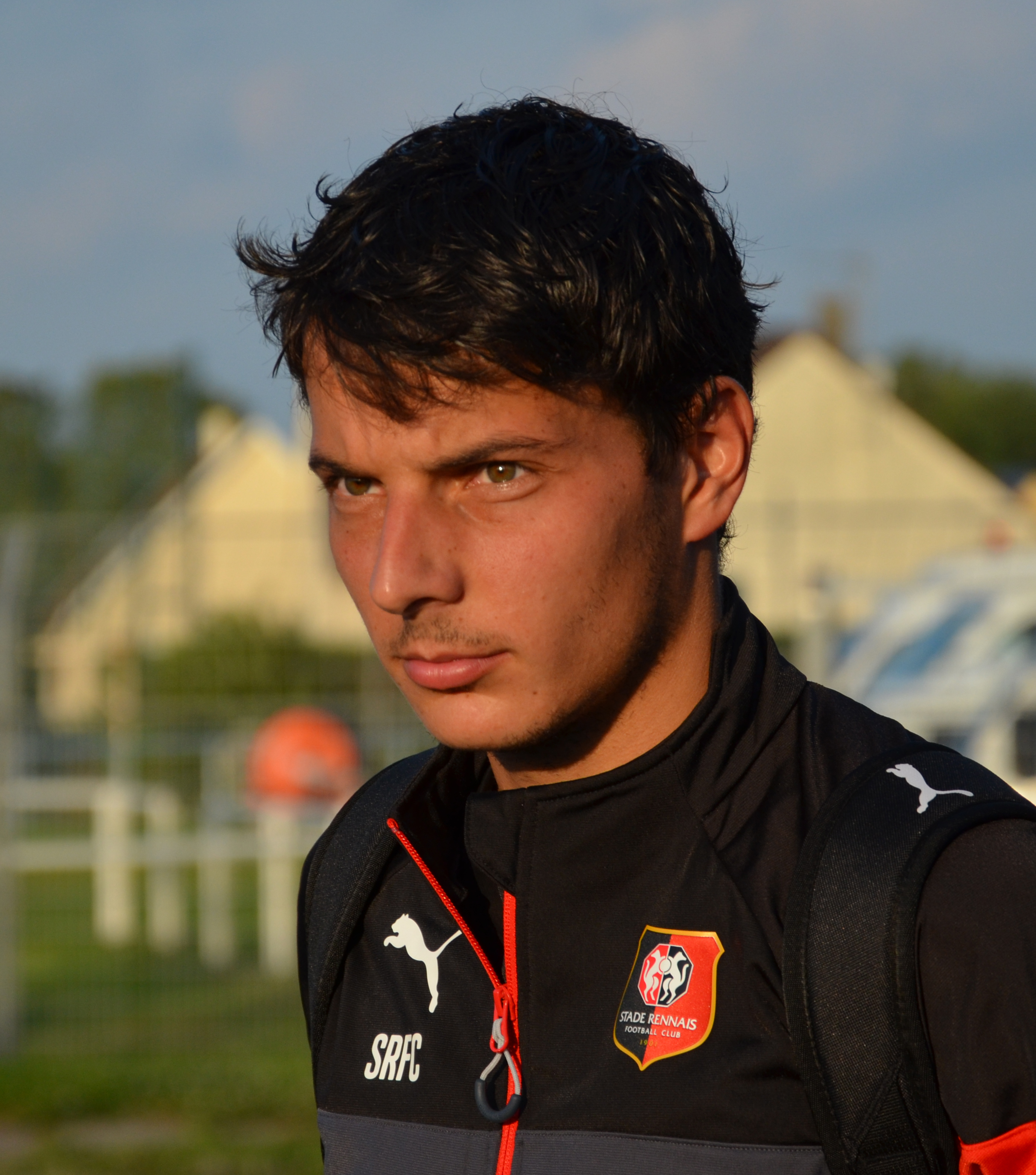 Photographie prise à l'occasion de la rencontre amicale opposant le Stade Malherbe de Caen au Stade rennais, le 9 juillet 2014 au stade Pierre-Comte de Vire. Ici, Philipp Hosiner.